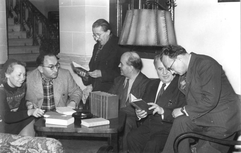 Illus-Rudolph 5.1.51 1. Buchserie fortschrittlicher Schriftsteller erscheint. Die ersten zehn Bände der Bibliothek fortschrittlicher Schriftsteller, die nach der Kulturverordnung der DDR vom 16.3.50 herausgegeben wird, erscheinen jetzt. Aus diesem Anlaß fand am 5.1.51 im Kulturbundhaus in Berlin eine Pressekonferenz statt. UBz: Jan Petersen (2. von links) Prof. Wieland Herzfelde (Mitte) Willi Bredel (daneben rechts) im Gespräch. Ganz rechts: [Fritz] Schälicke, Leiter des Dietz-Verlages.